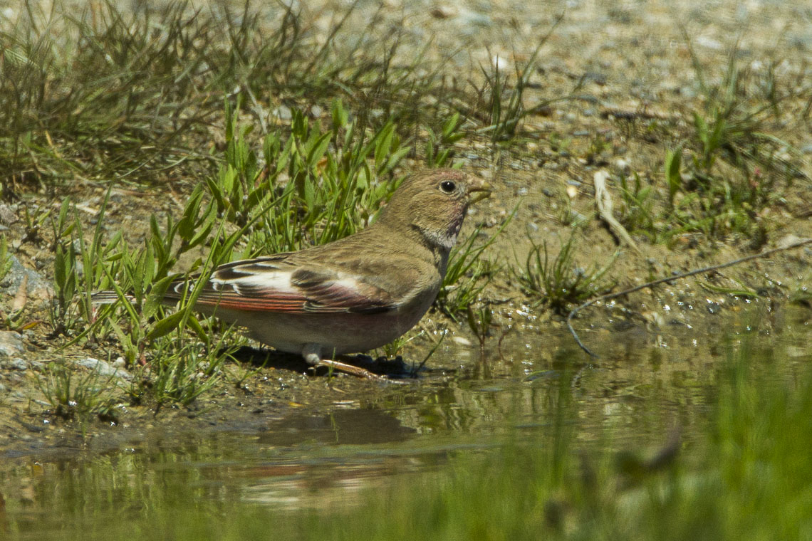 Mongolian Finch - Almaty - Kazakistan_S4E2339